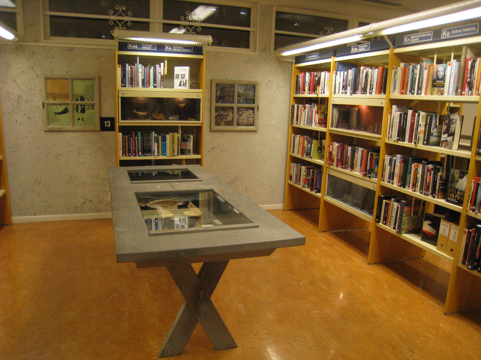 Koffsanmuseet på Jakobsbergs bibliotek i Järfälla kommun.